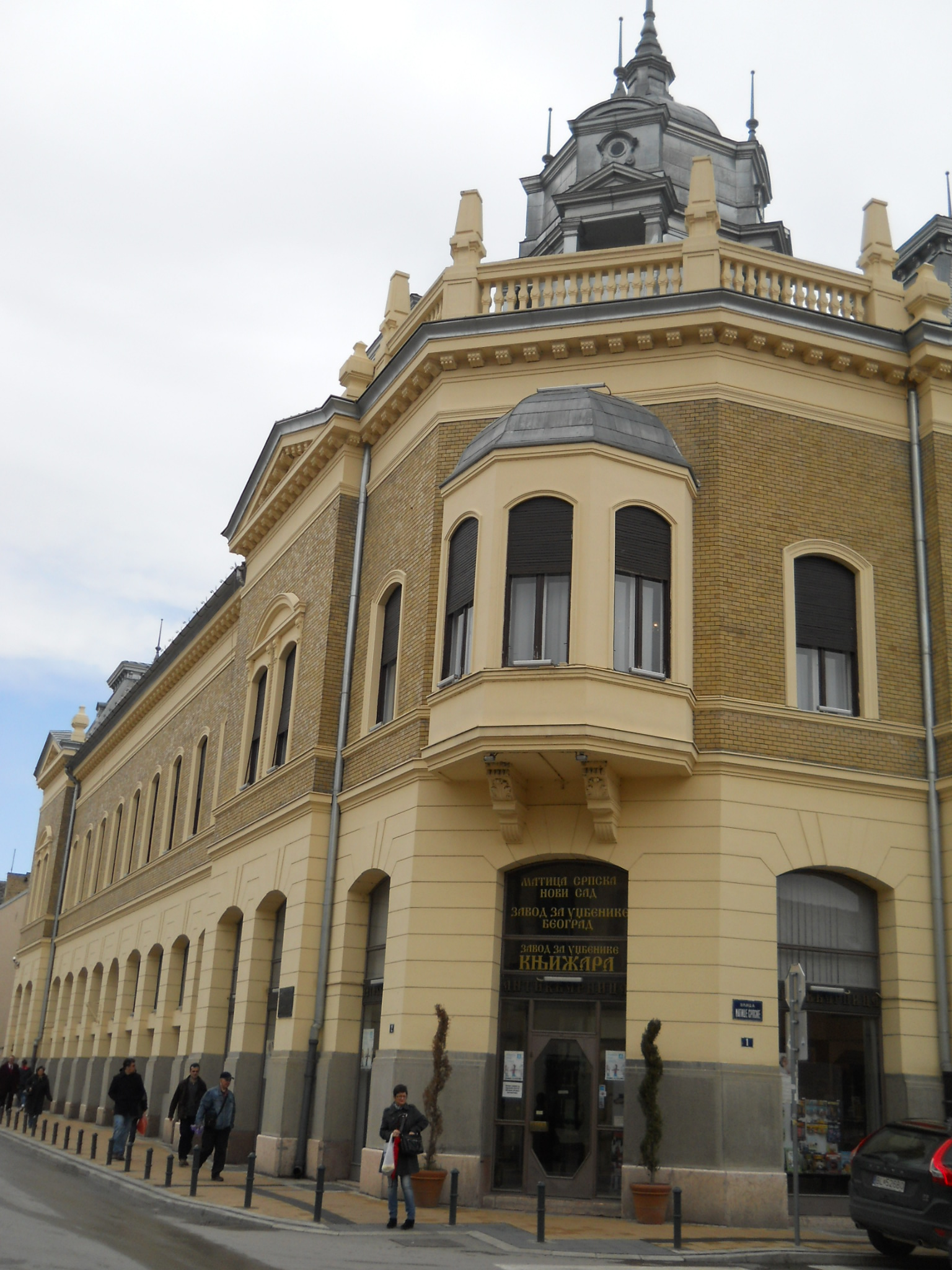 Újvidék - Matica srpska